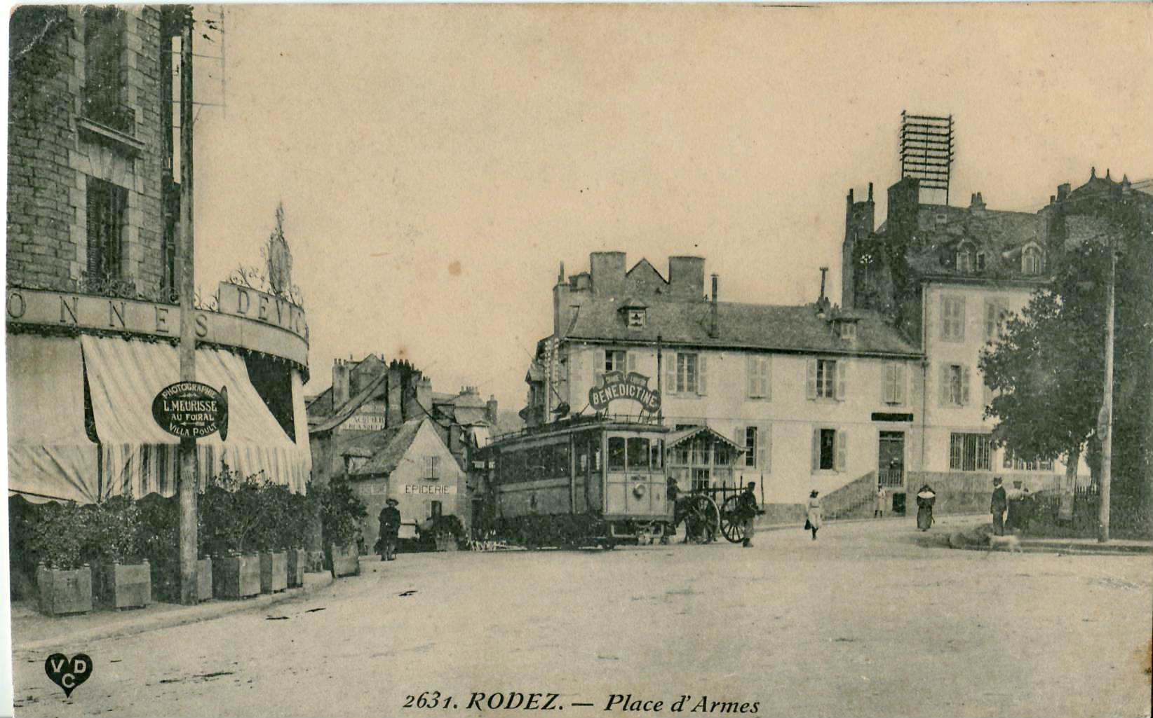 Carte postale ancienne éditée par VDC n°2631 :RODEZ - Place d'armes